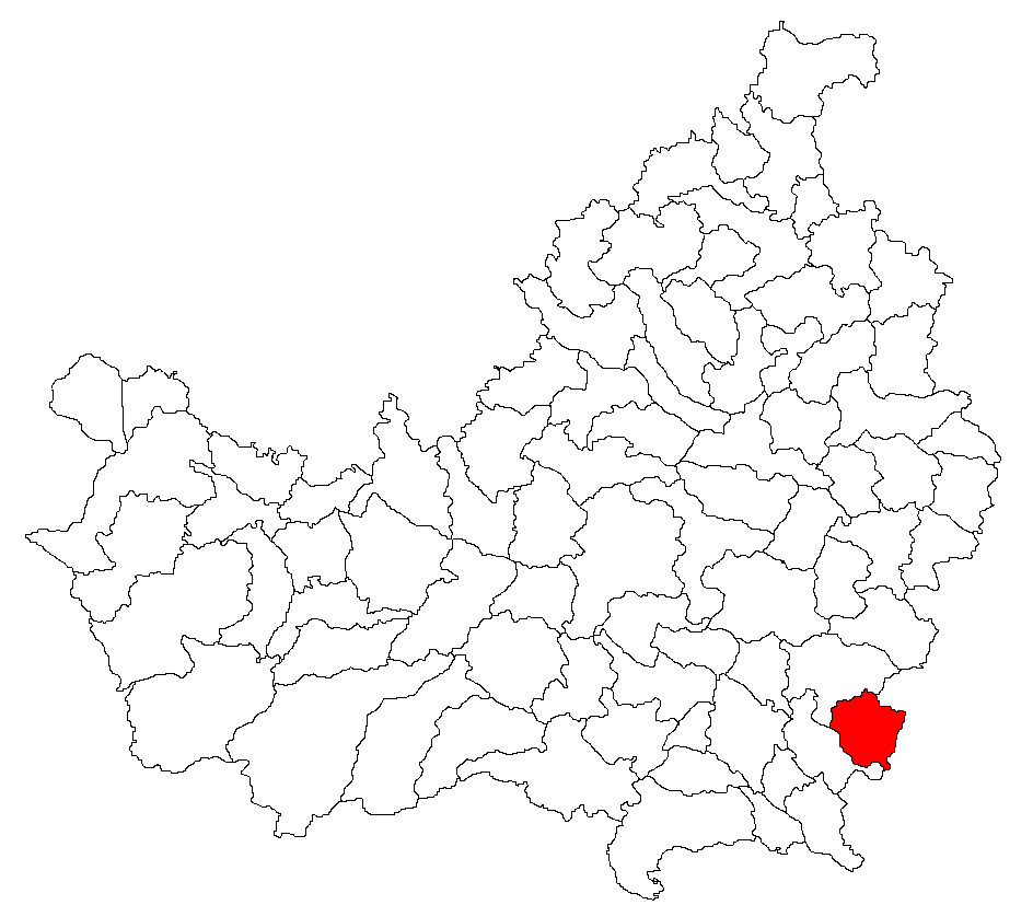 Comuna Tritenii de Jos, judeţul Cluj